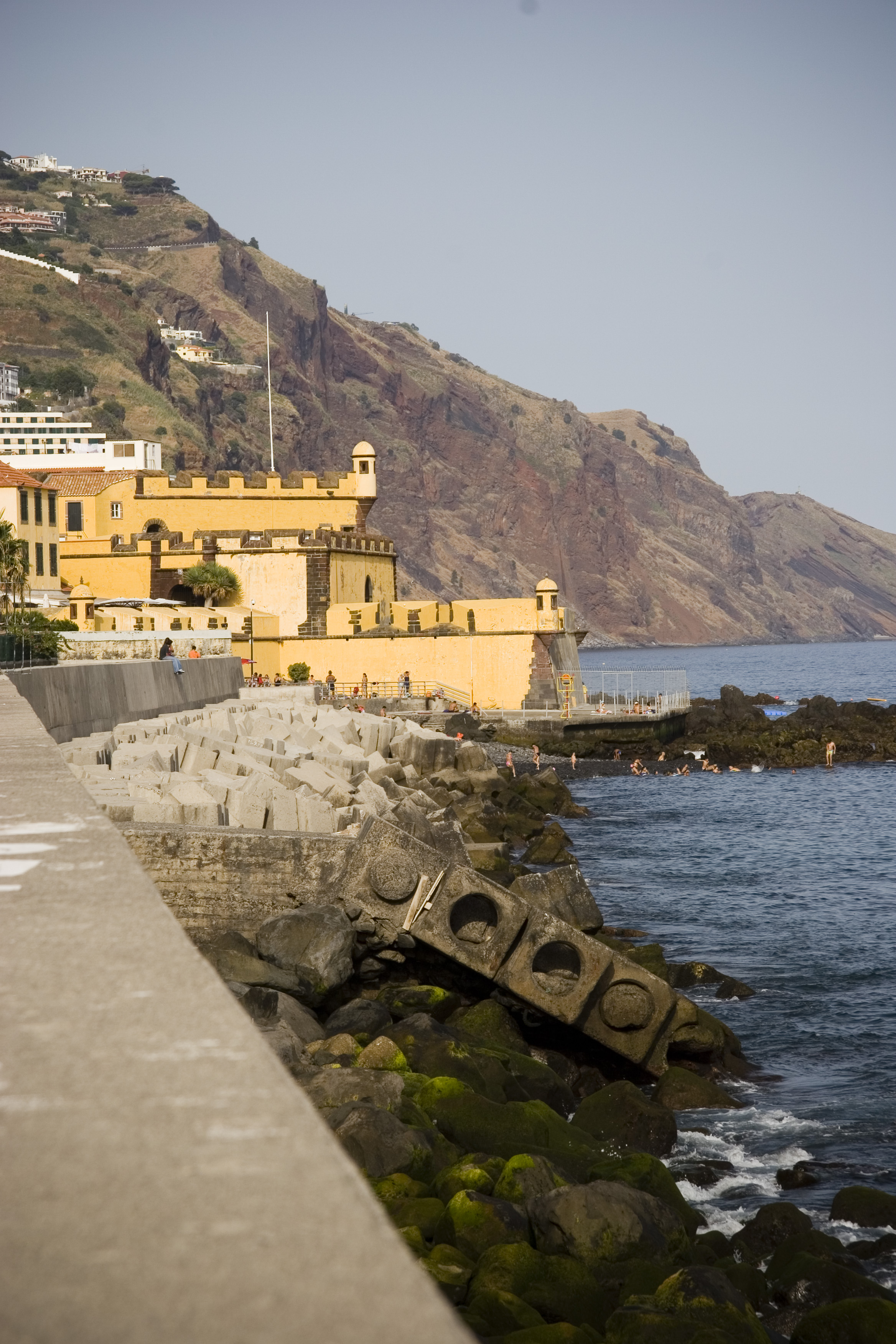 Forte de S. Tiago, Funchal